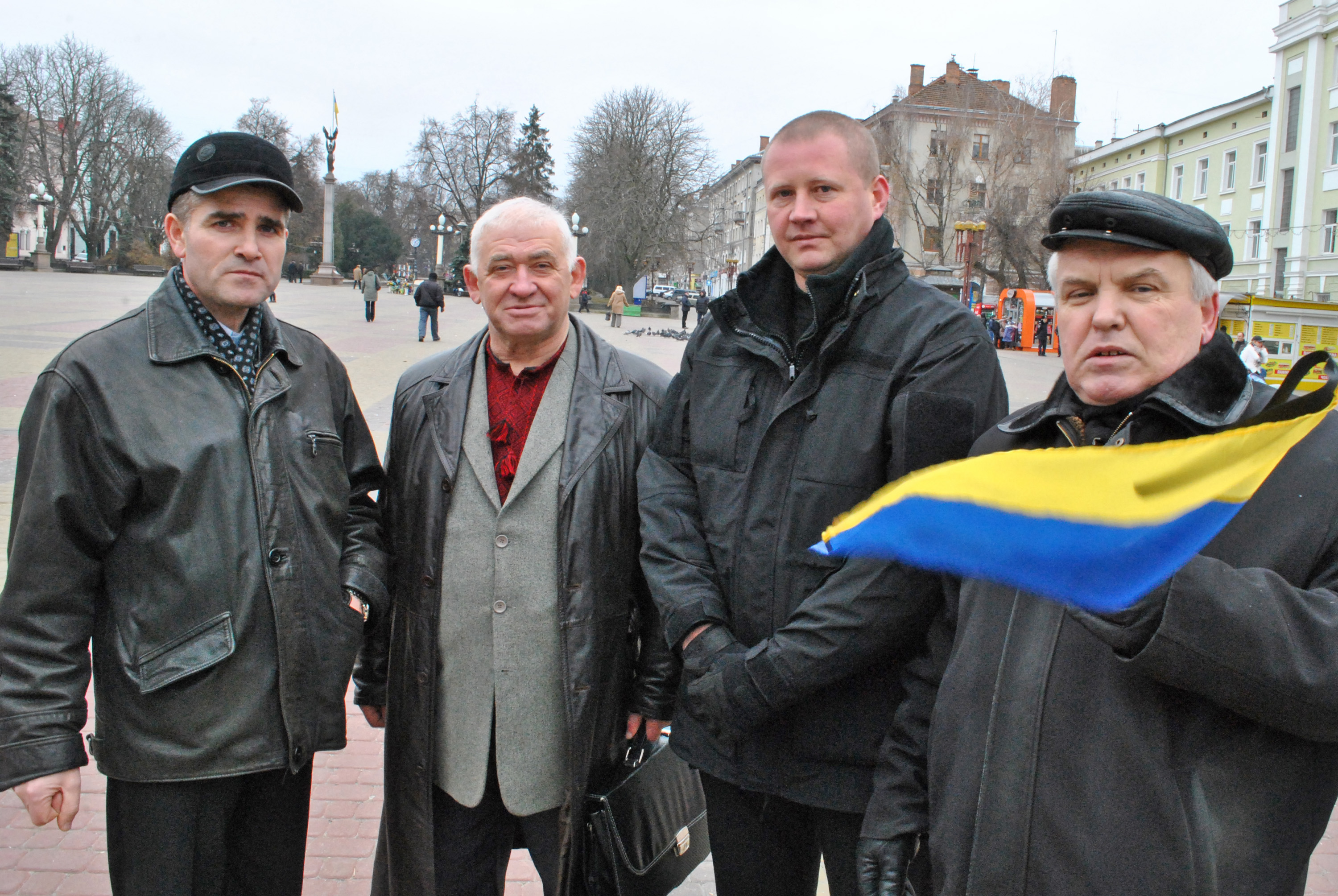 Тернопільські громадсько-політичні діячі: невідомий, народний депутат України 1-го скликання Володимир Колінець, сотник 18-ї сотні Самооборони Майдану, заступник командира батальйону «Айдар» («Стріла»), народний депутат України 8-го скликання, Володимир Соляр, ?. Болєщук.